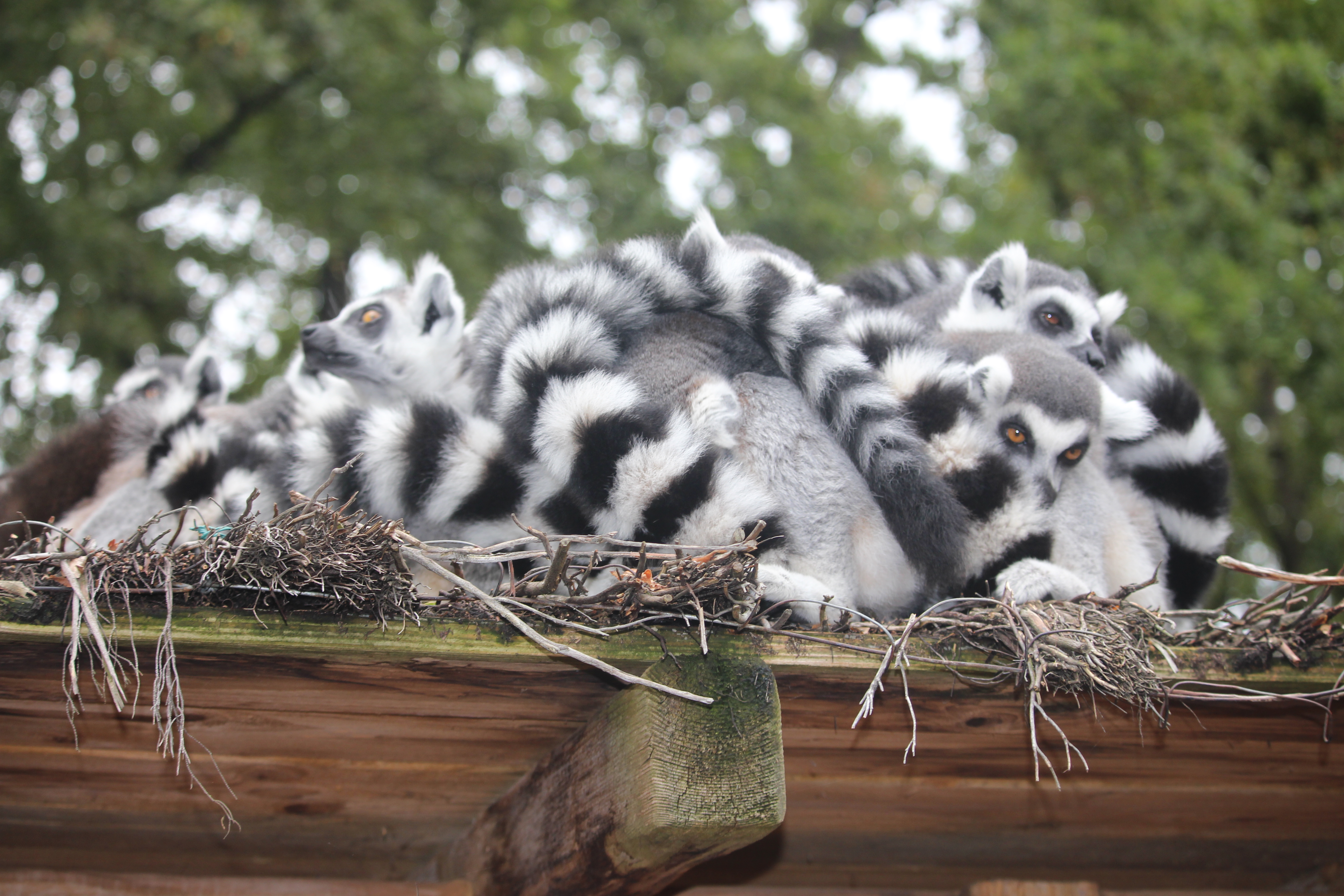 Des makis Cattas réunis en boule sur le toit d'une maison dans le Zoo de la Flèche